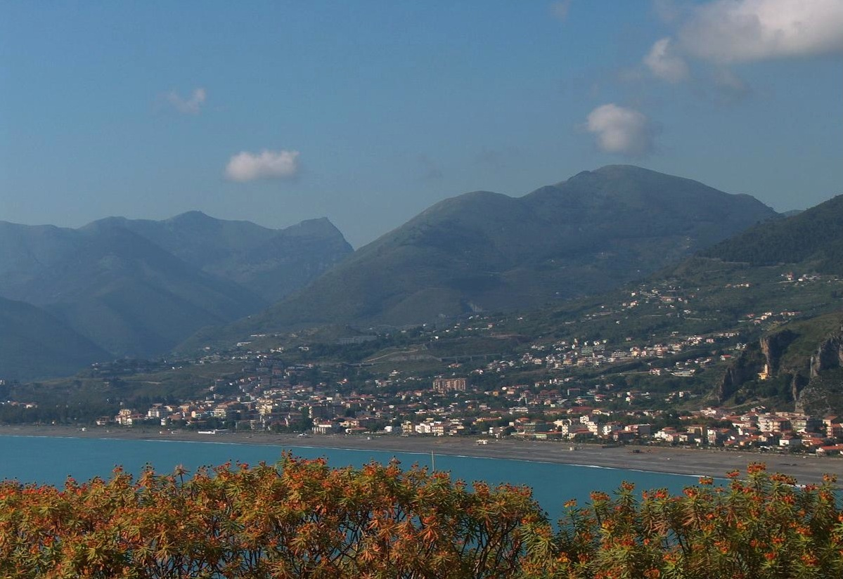 Pohled na město Praia a Mare